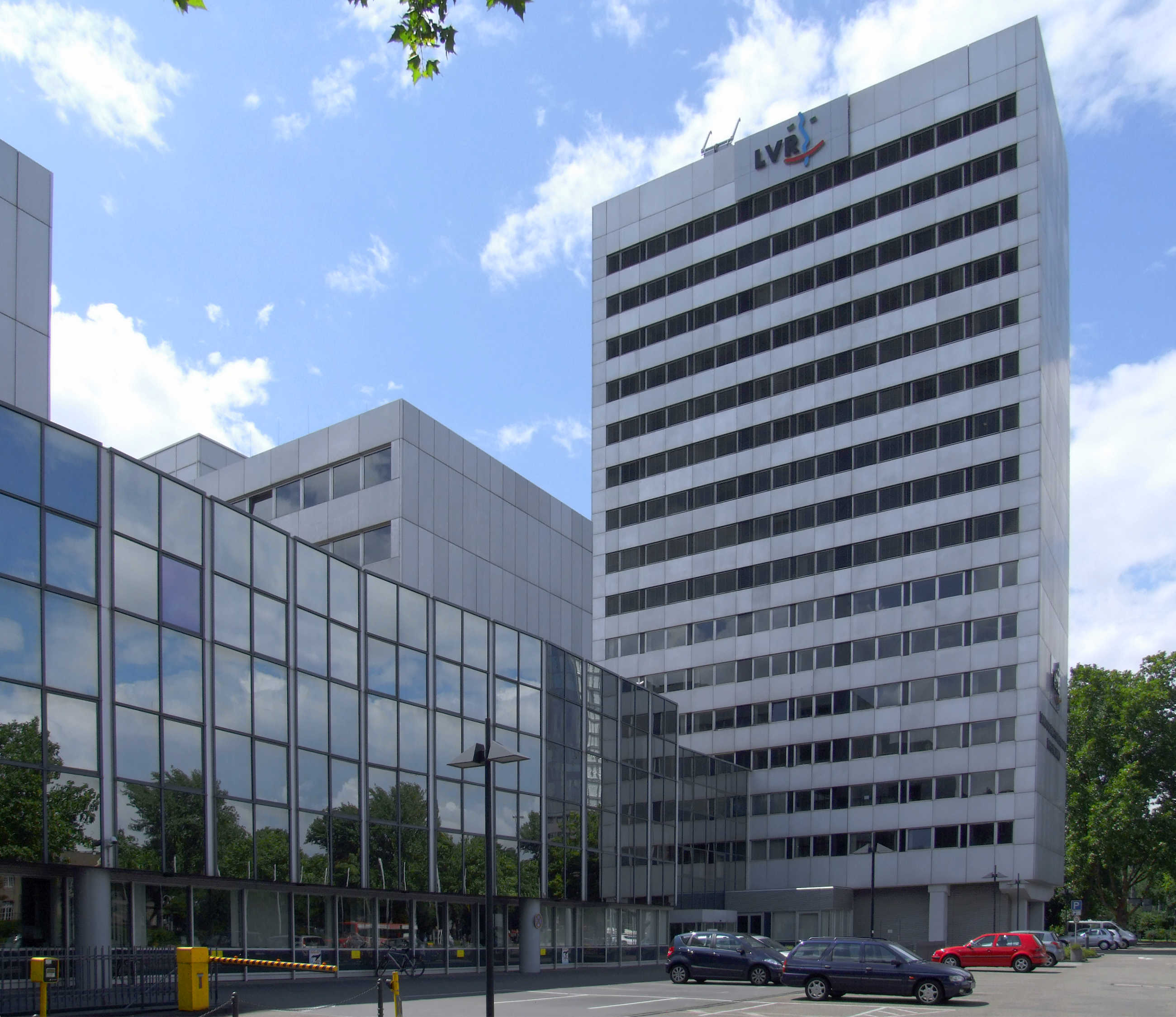 LVR-Gebäude Köln-Deutz